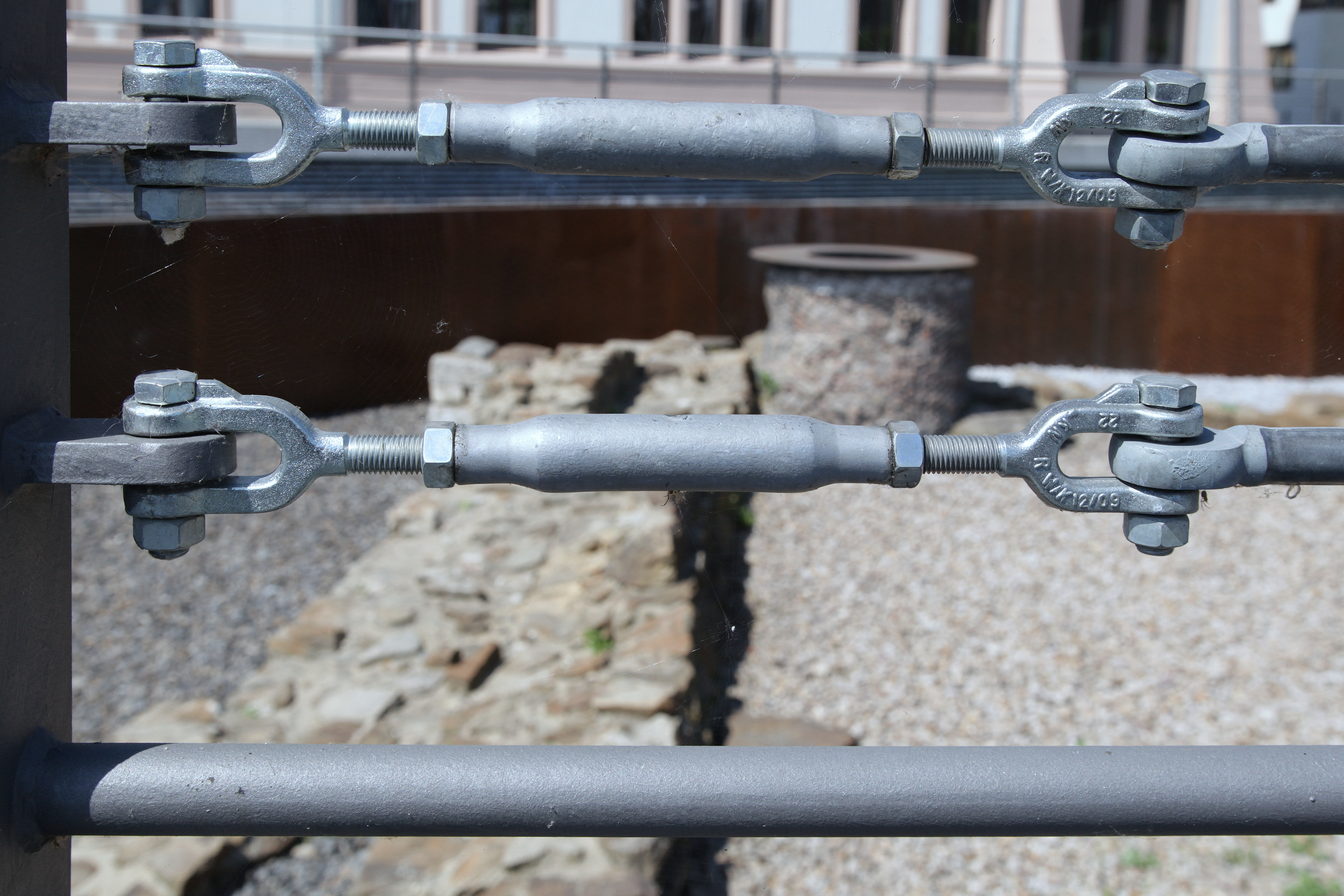 Ausgrabung der ursprünglichen Hörder Burg auf dem Hörder Burgplatz in Dortmund